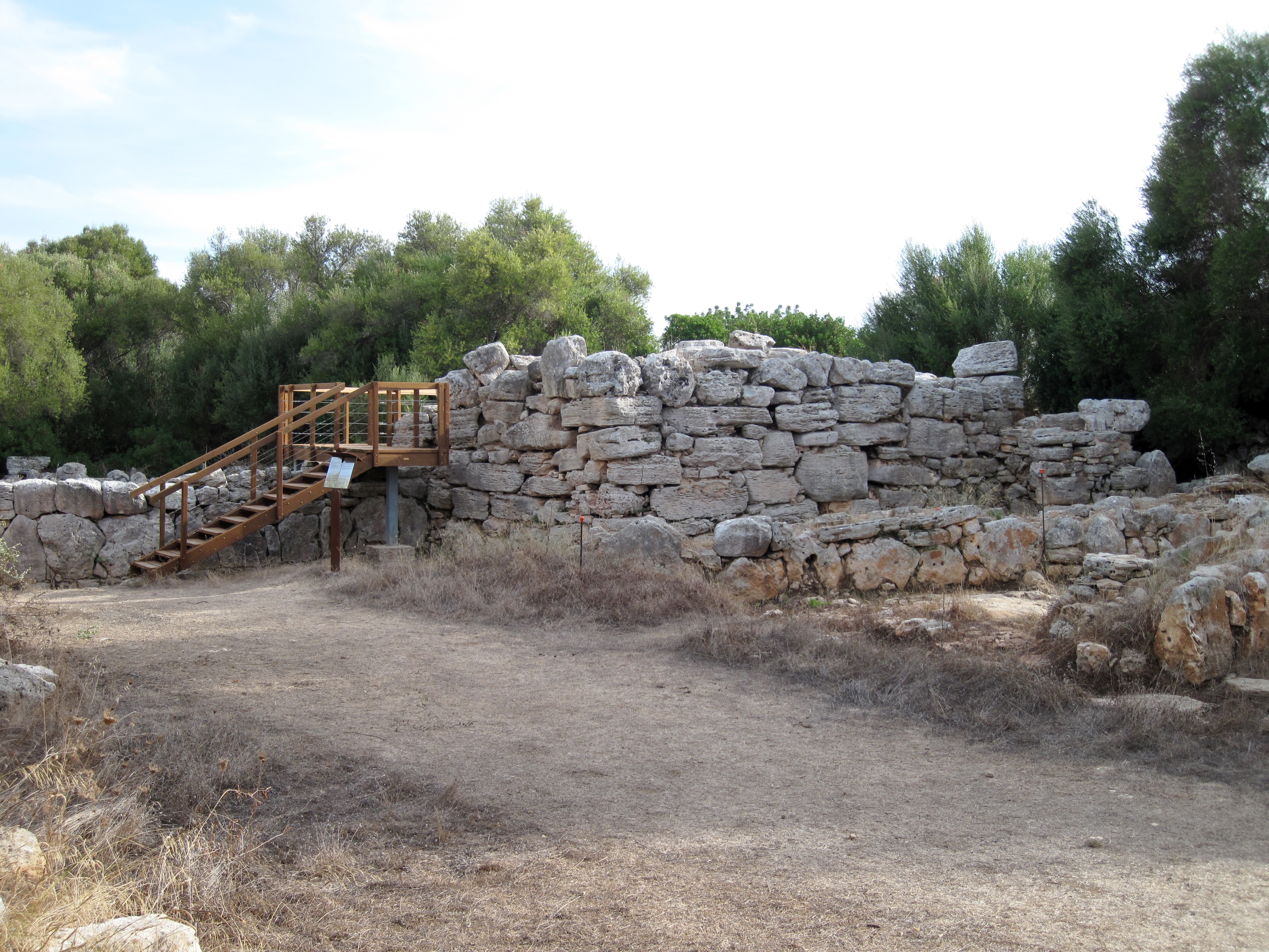 Quadratischer Talaiot des talaiotischen Dorfes von S’Hospitalet Vell, einer Ausgrabungsstätte in der Gemeinde Manacor, Mallorca, Spanien